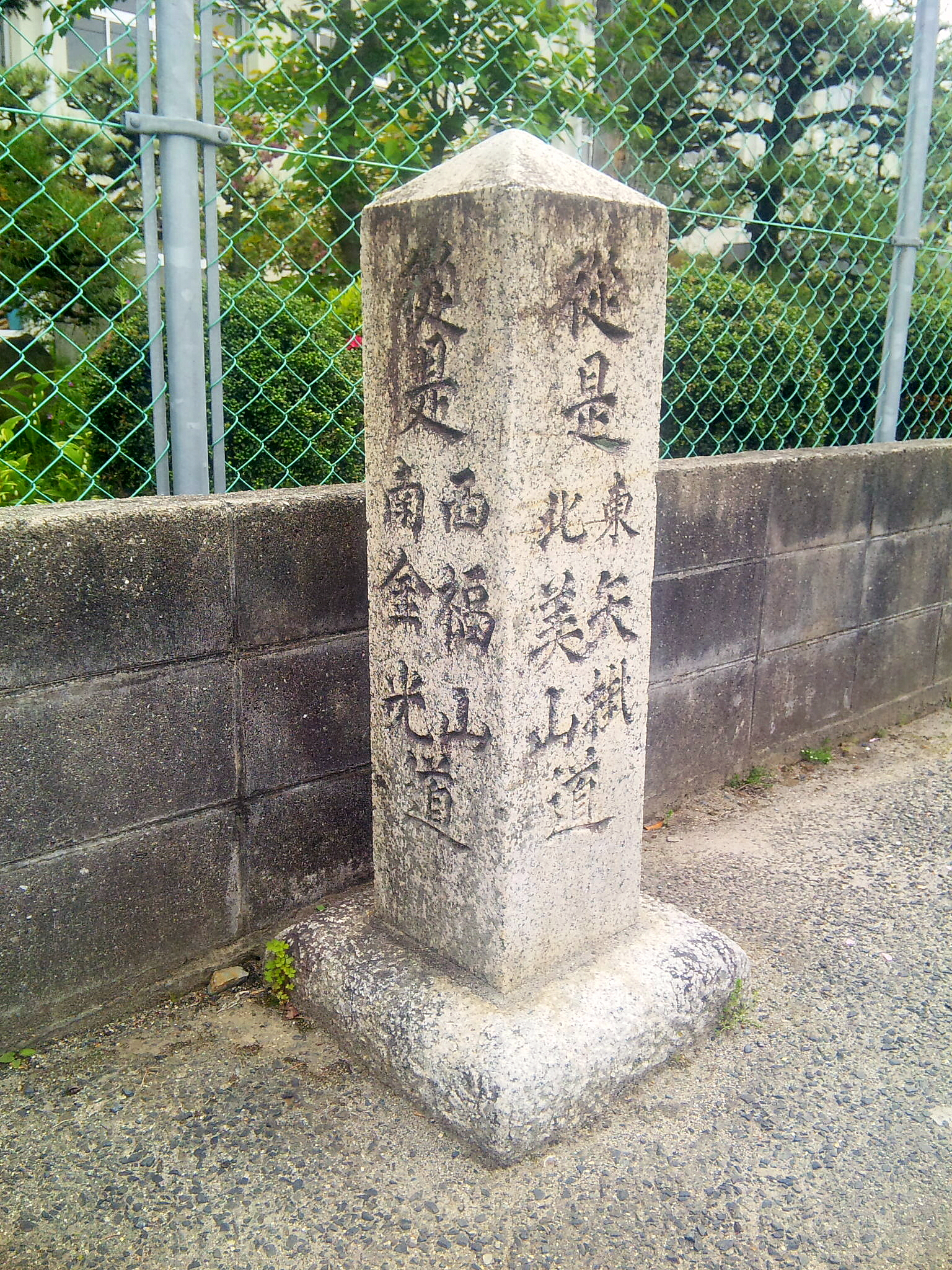 井原市立木之子小学校横の交差点にある旧街道の道標。「従是 東 矢掛 北 美山 道」、「従是 西 福山 南 金光 道」と刻まれている。（岡山県井原市木之子町）